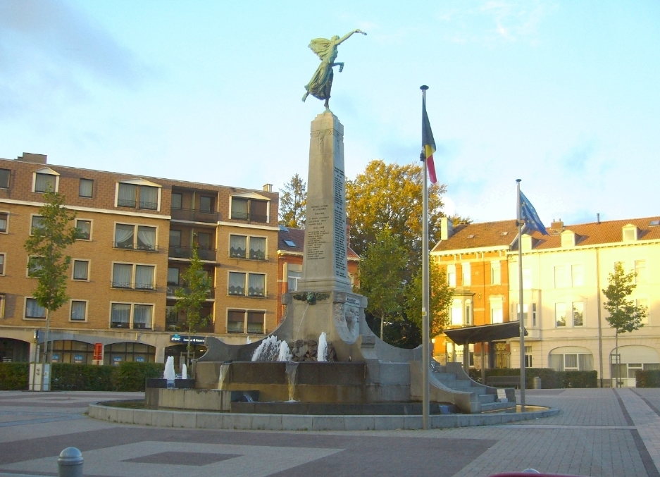 Welkenraedt, fontaine de la Place des Combattants.